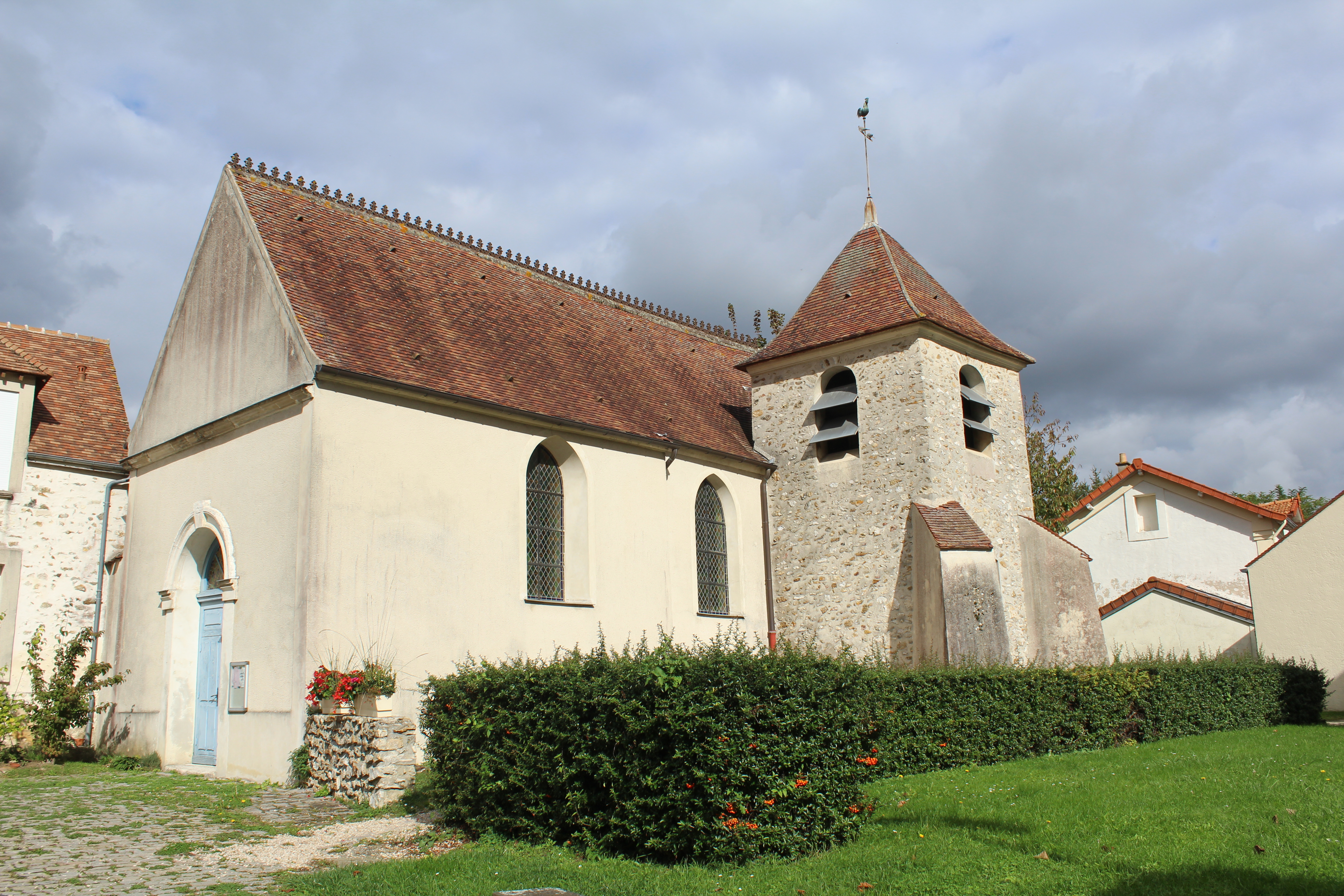 Église Saint-Eutrope de Chanteloup-en-Brie.